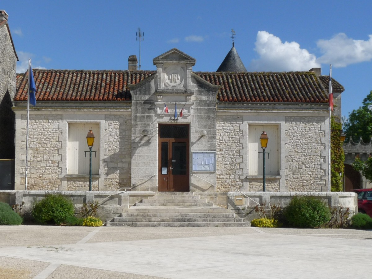 Mairie de Chazelles, Charente, France